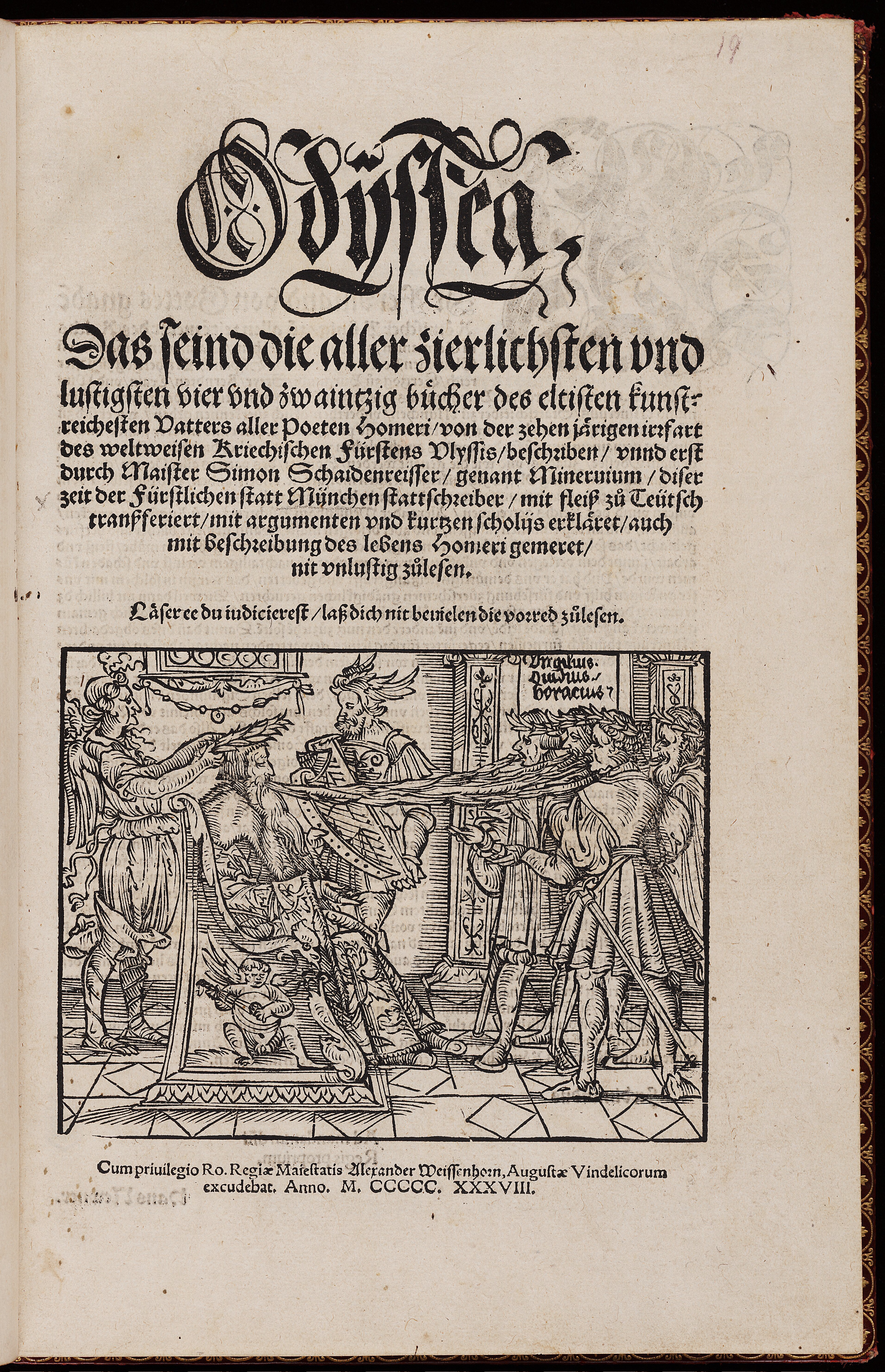 Odysseae versionis a Simone Minervio factae titulus. Augustae Vindelicorum 1537